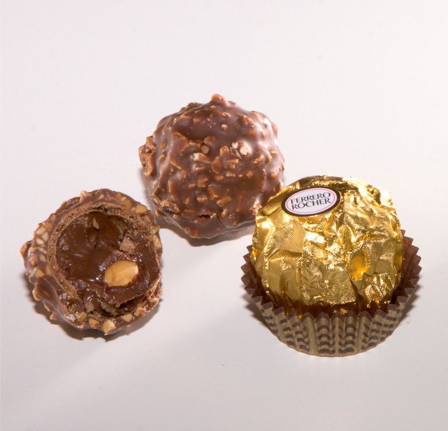 Ferrero Rocher